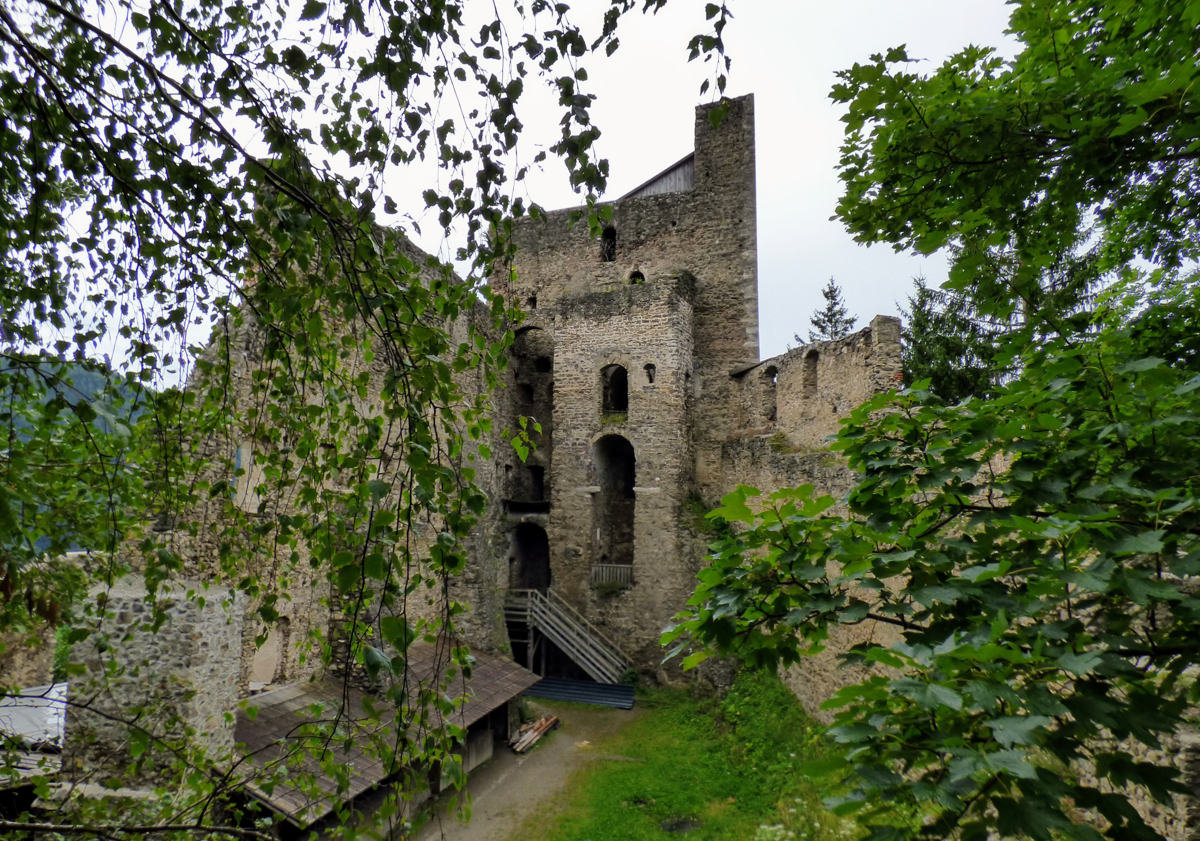 Burgruine Frauenburg, Gemeinde Unzmarkt-Frauenburg, Steiermark